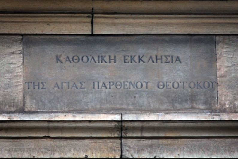 Reggio Calabria: iscrizione in greco sulla chiesa della Cattolica dei Greci